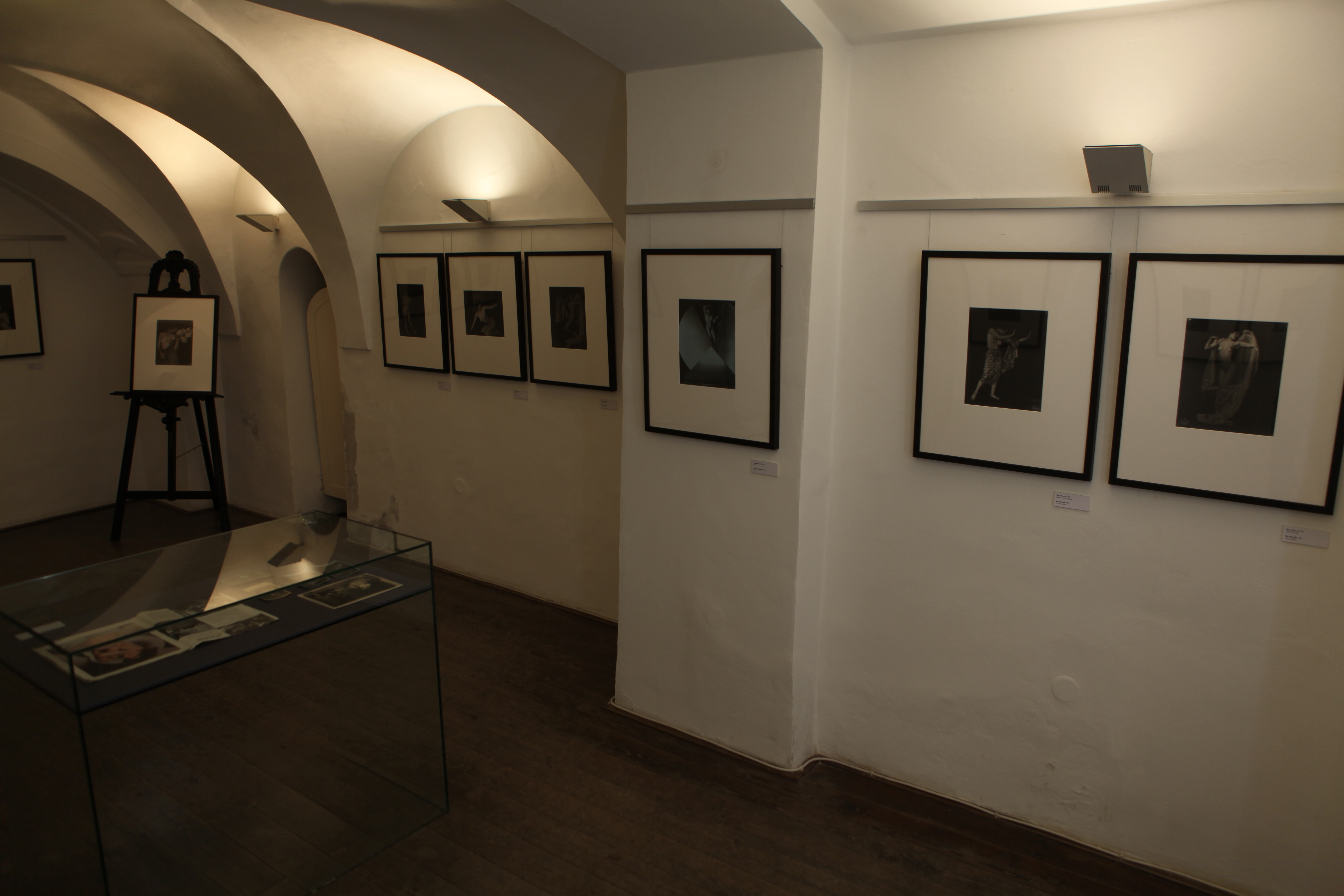 Josef Sudek Gallery